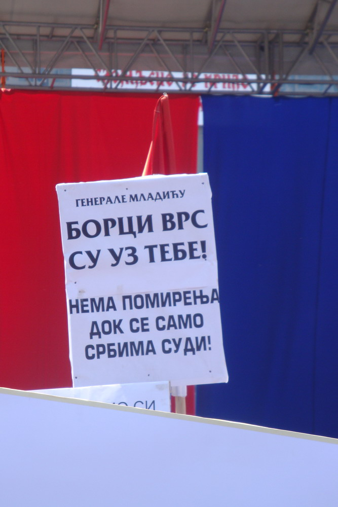 Митинг_подршке_генералу_Ратку_Младићу_у_Бањалуци